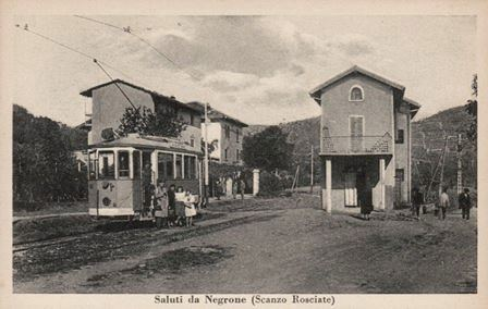 Negrone.JPG